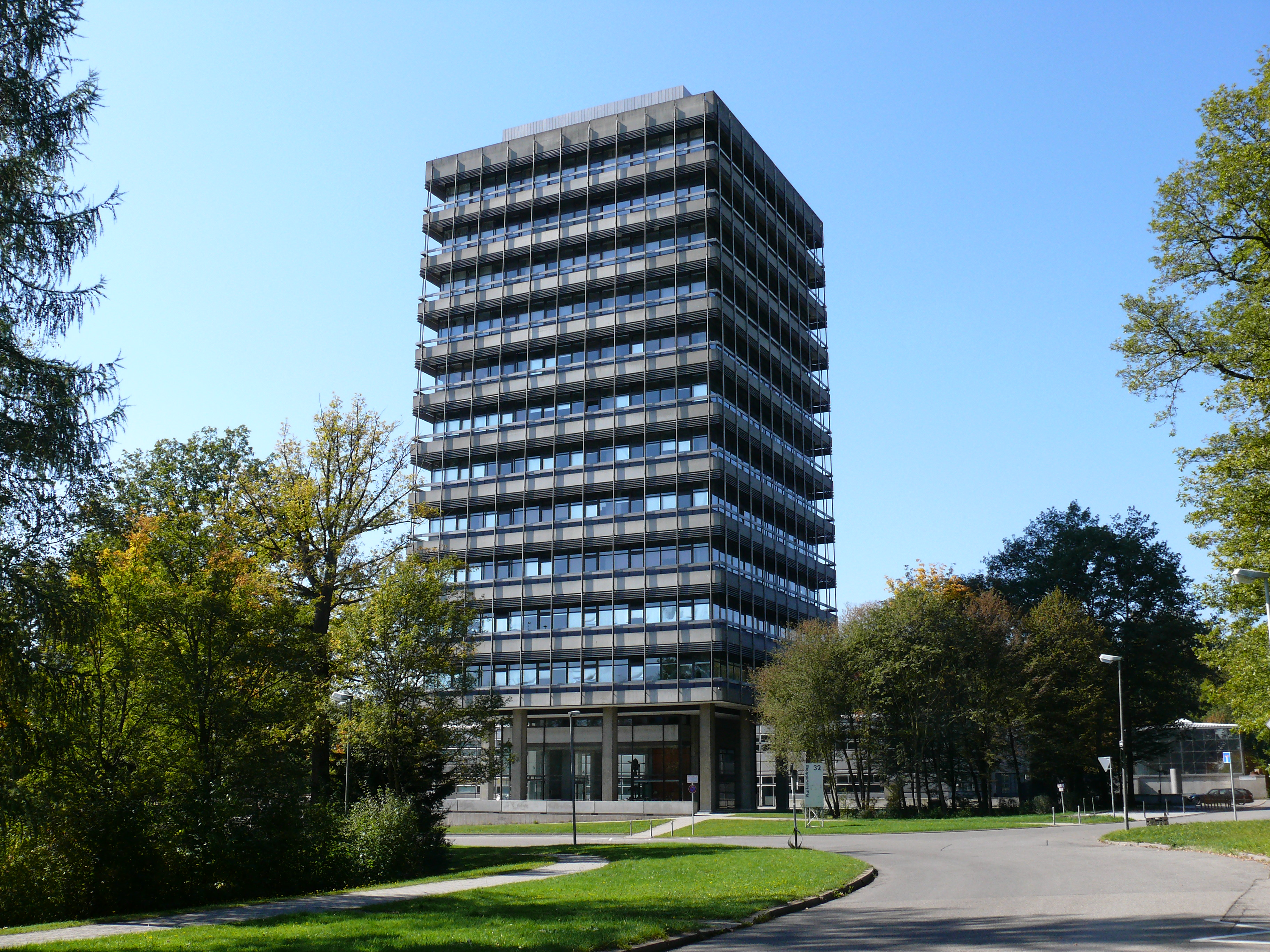 Das MPA Hochhaus auf dem Uni-Campus in Stuttgart-Vaihingen.